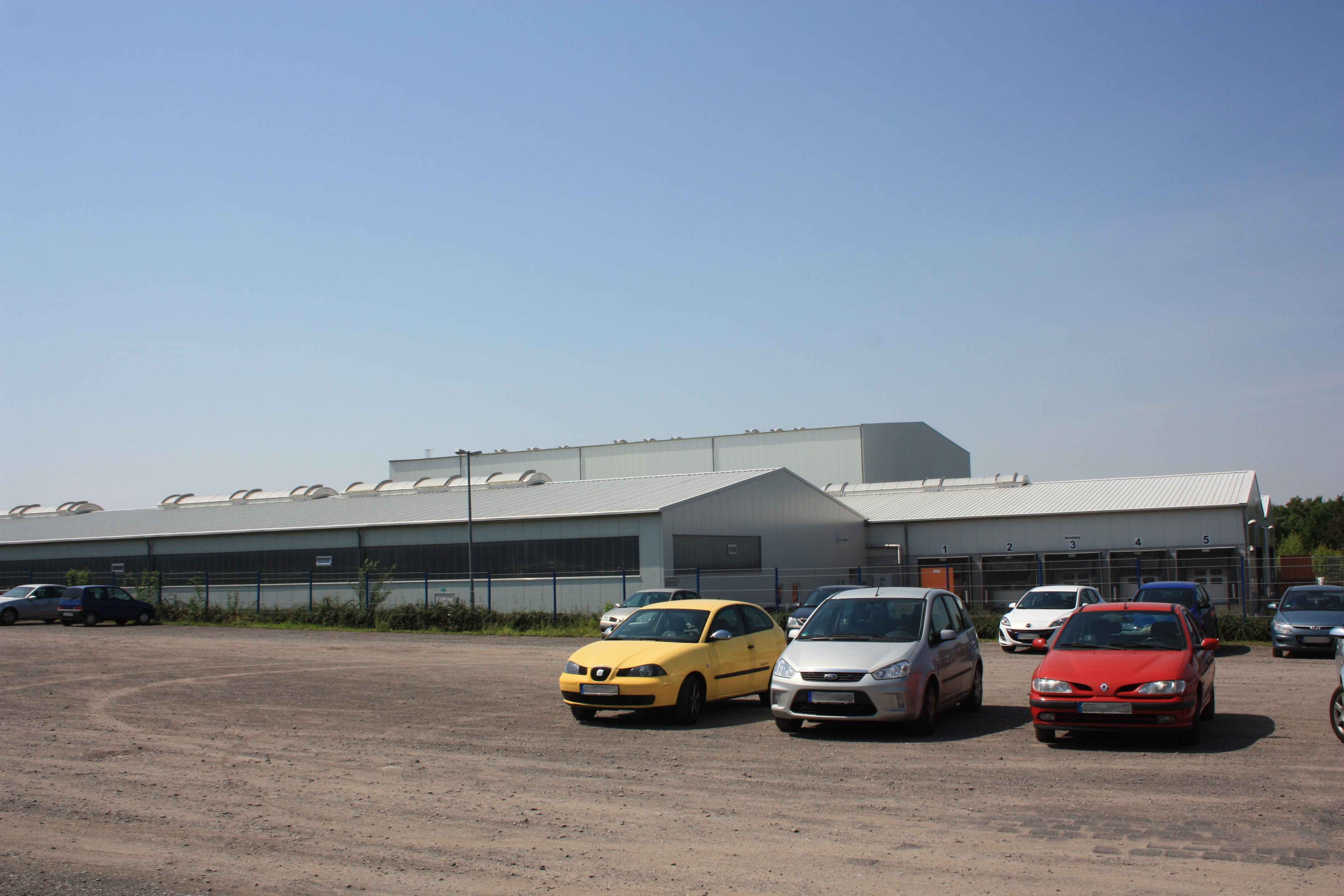 das MIFA Werk in Sangerhausen